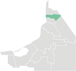 Mapa del municipio de Hecelchakán en el estado mexicano de Campeche